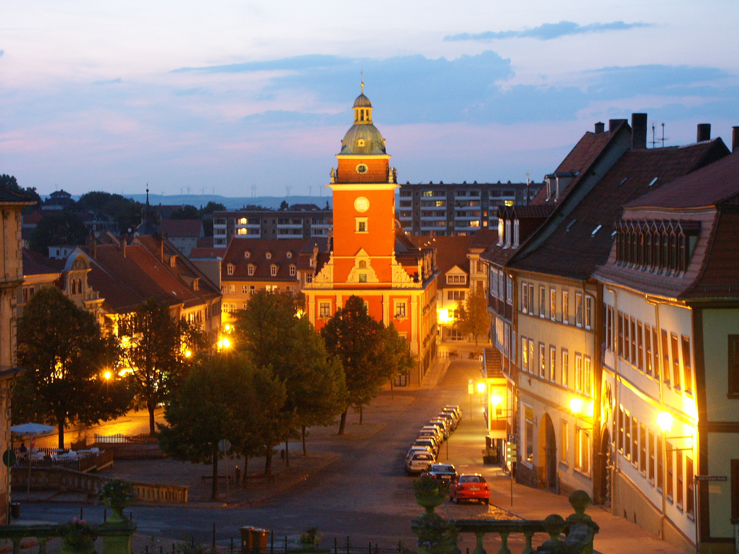 Das Rathaus und der obere Hauptmarkt Gothas am Abend.